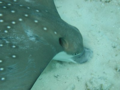 2002 François Battail Détail de la tête d'une raie léopard juvénile photographiée aux Maldives